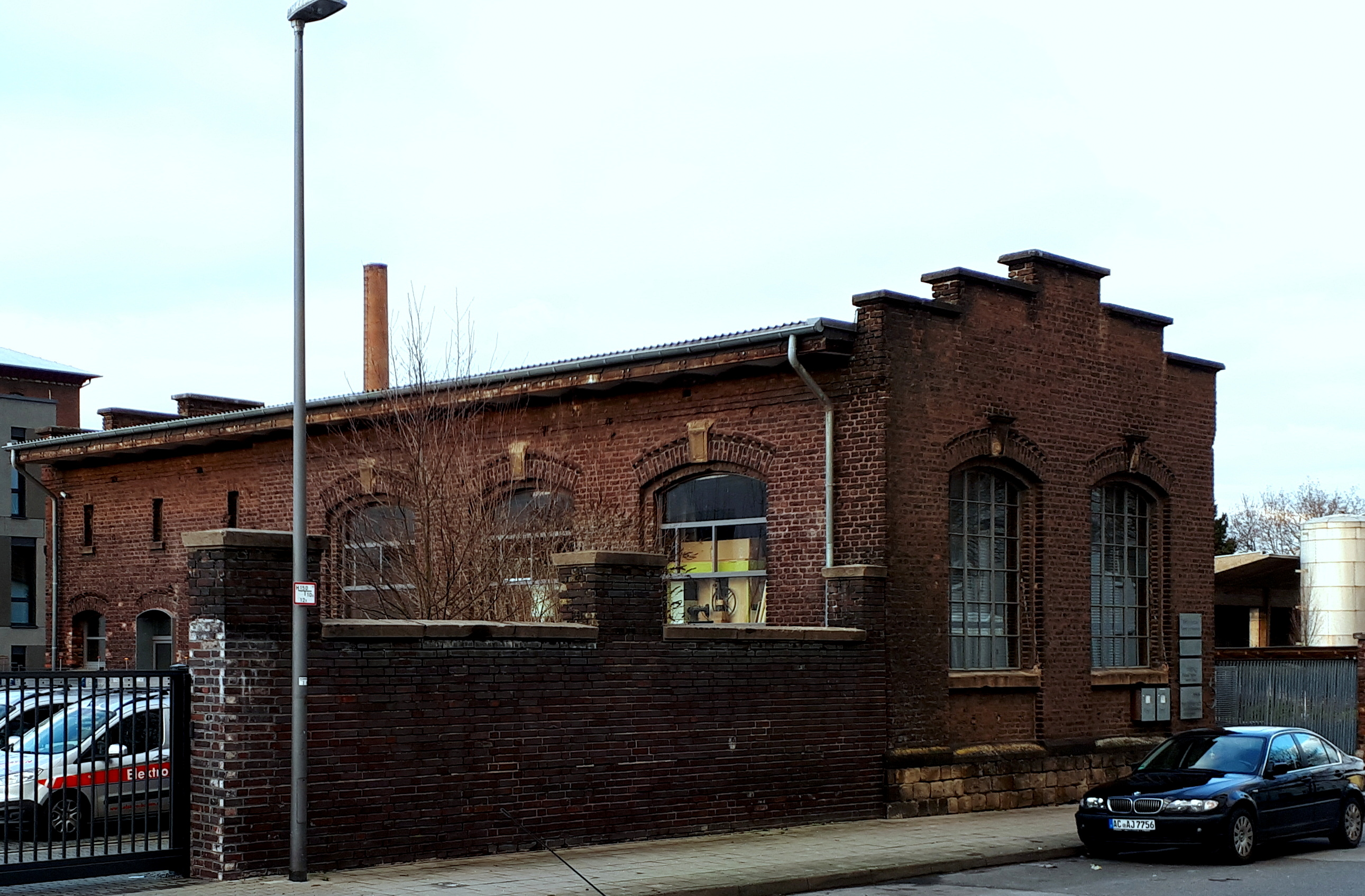 Pferdeschlachthalle des Alten Schlachthofes Aachen, Baudenkmal